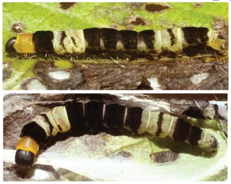 Ethmia catapeltica